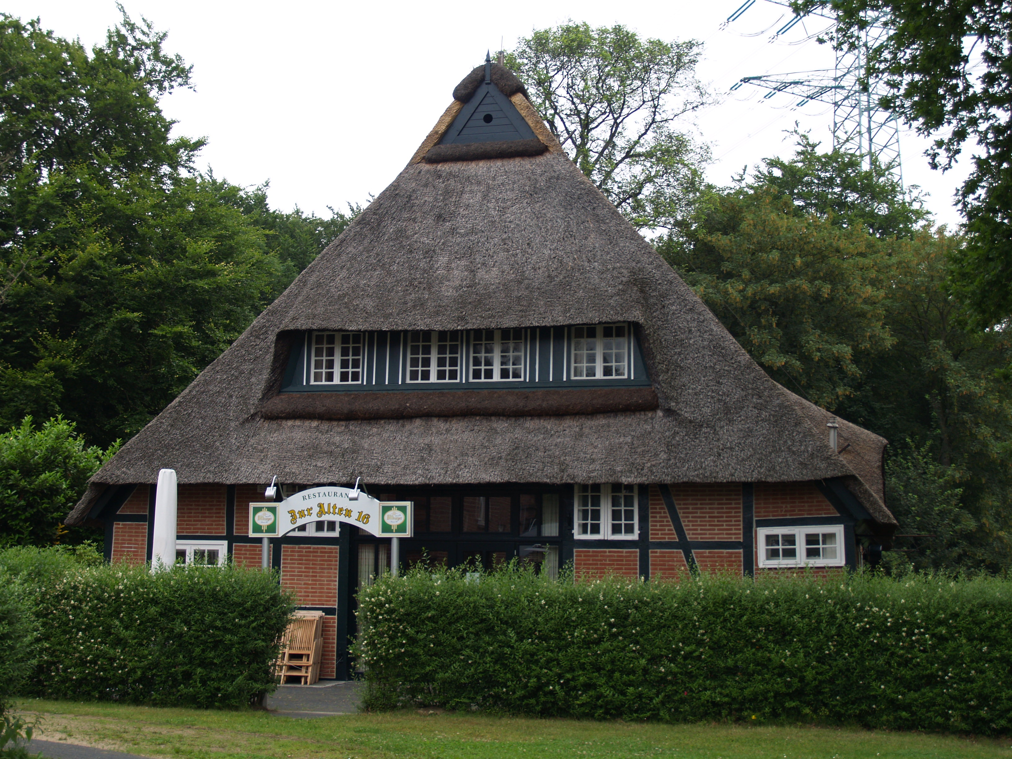 Fachhallenhaus in Wentorf, Herzogtum Lauenburg, Deutschland